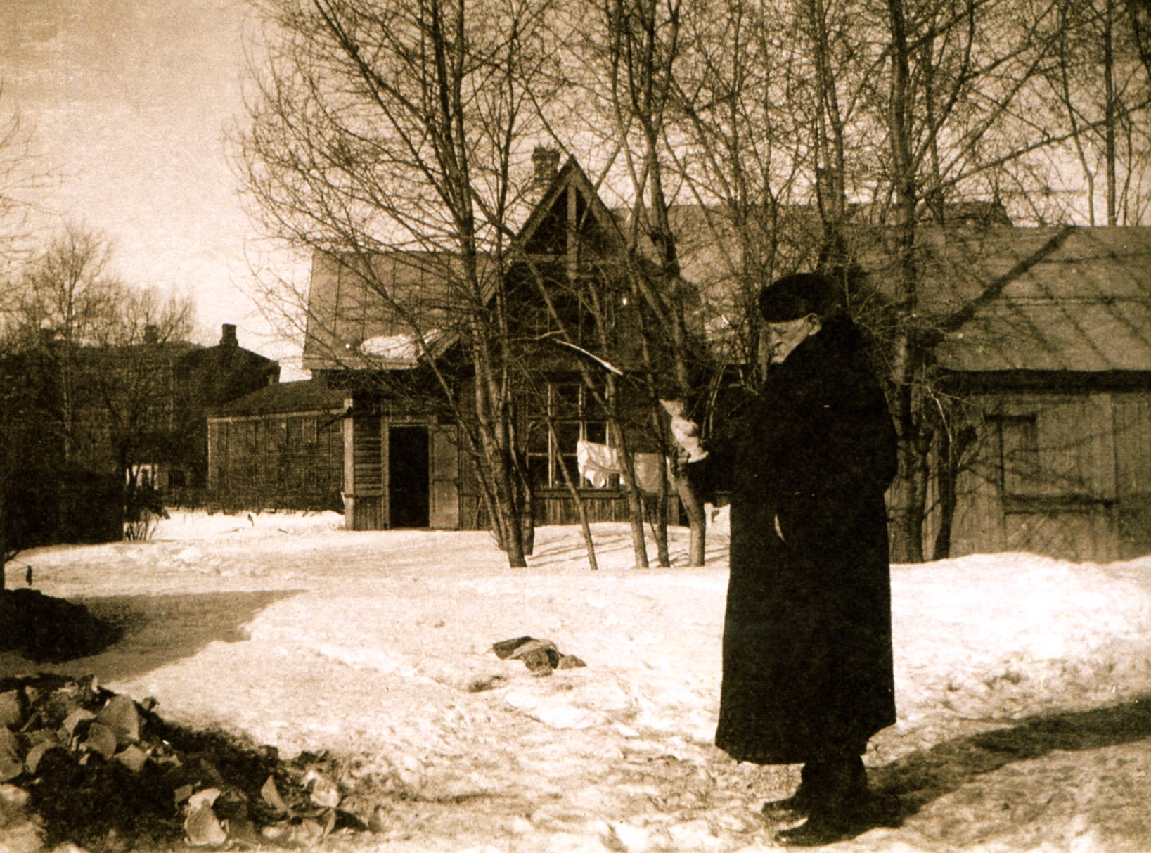 С. И. Мамонтов. Хутор на Бутырках. 1910-1912 гг.